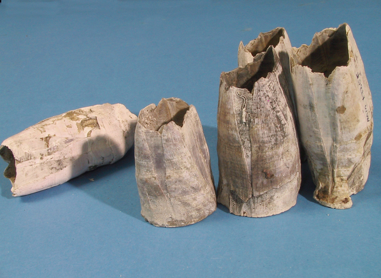 Fra Fredensborgutstillingen på Aust-Agder kulturhistoriske senter, Arendal. Langhalser, fra tropiske strøk, fra skipets bunn.